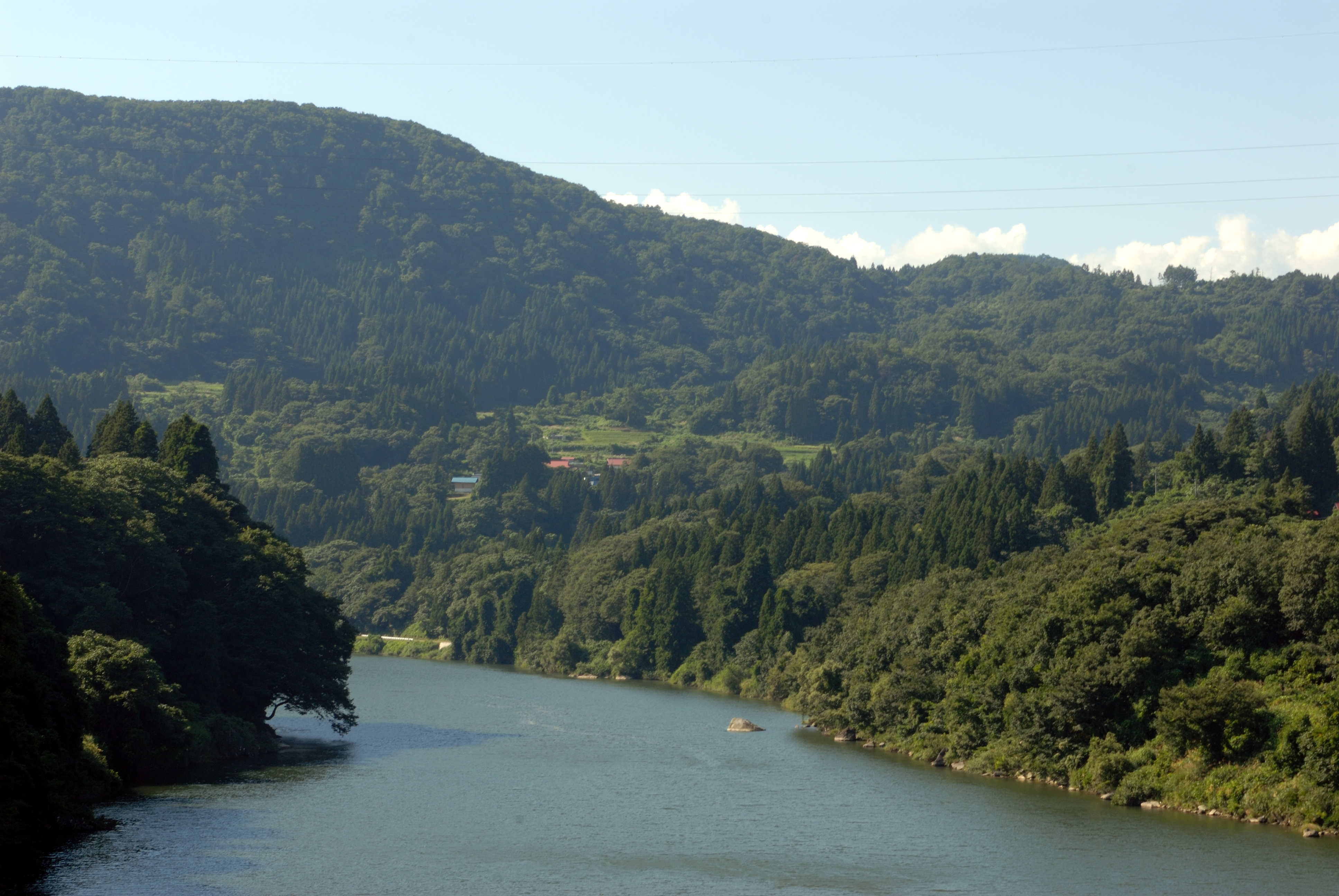 Agano River near Kitakata